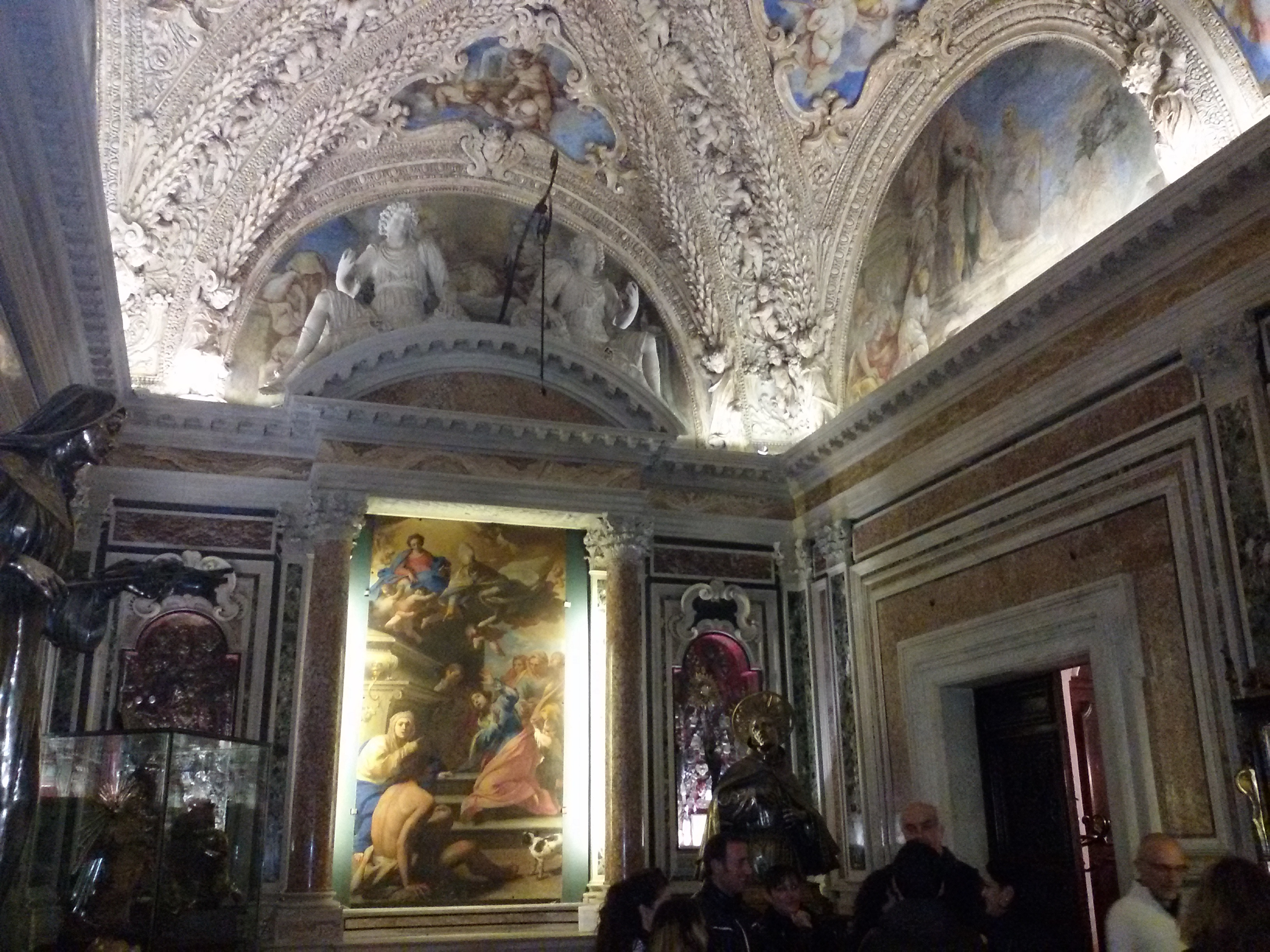 Cappella della Concezione - Reale cappella del Tesoro di San Gennaro (Museo del Tesoro)